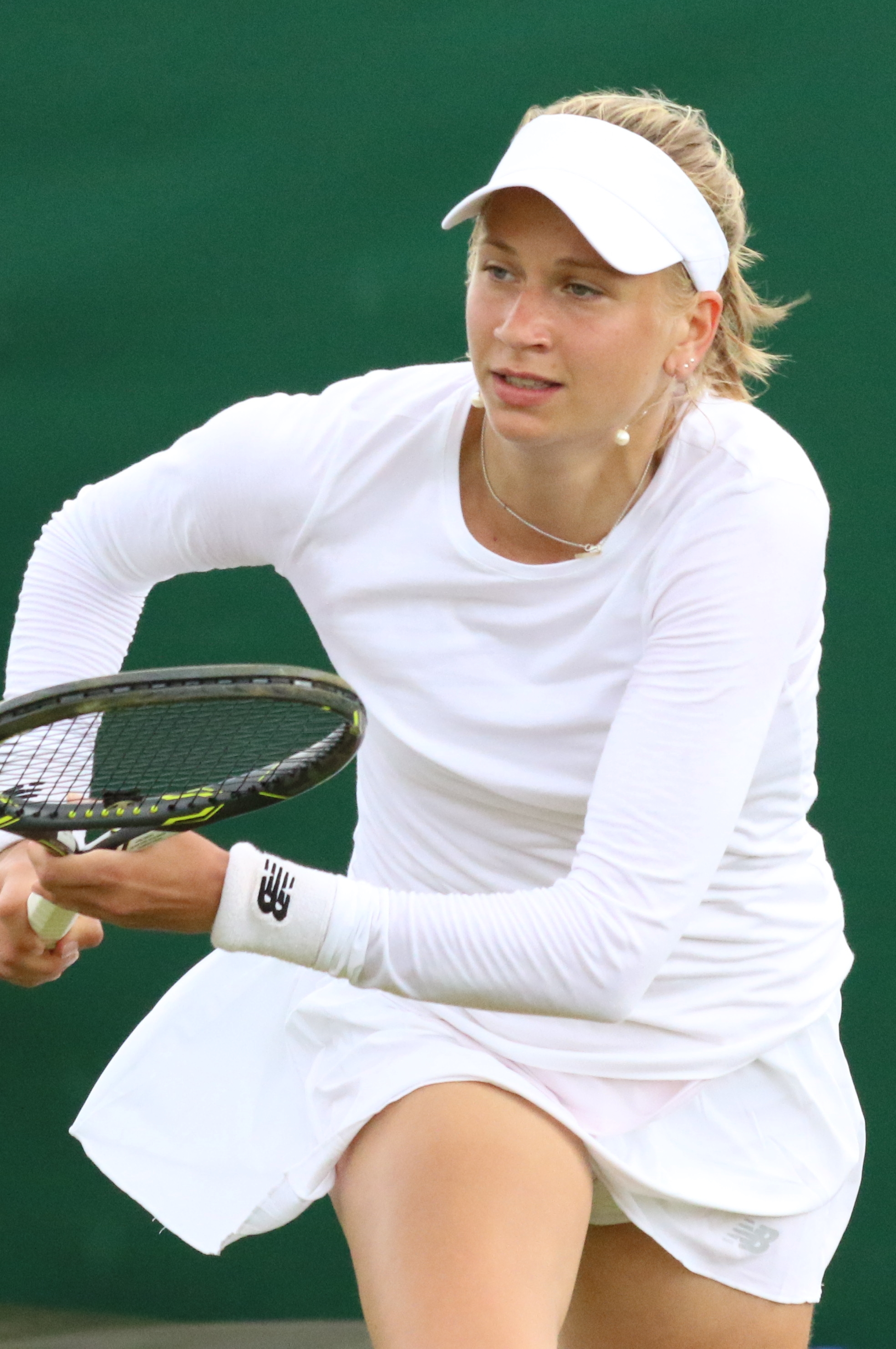 Georges WMQ16 (10)